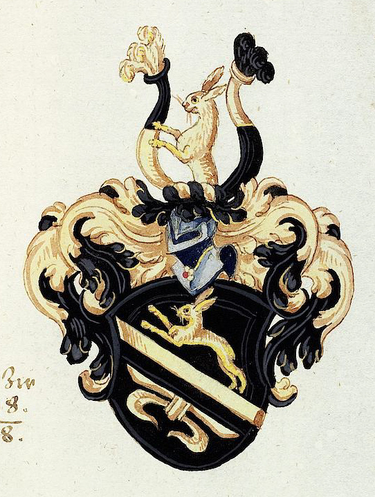 Wappen aus dem Wappenbuch des Hofpfalzgrafen Franz Rasso Gotthardt. Entstanden in Süddeutschland (Passau?) . Universitätsbibliothek Heidelberg, Cod. Sal. IX,58.Wappen Helias Haimschwanger, Bürger und Bildhauer zu Passau, bewilligt 18. April 1598